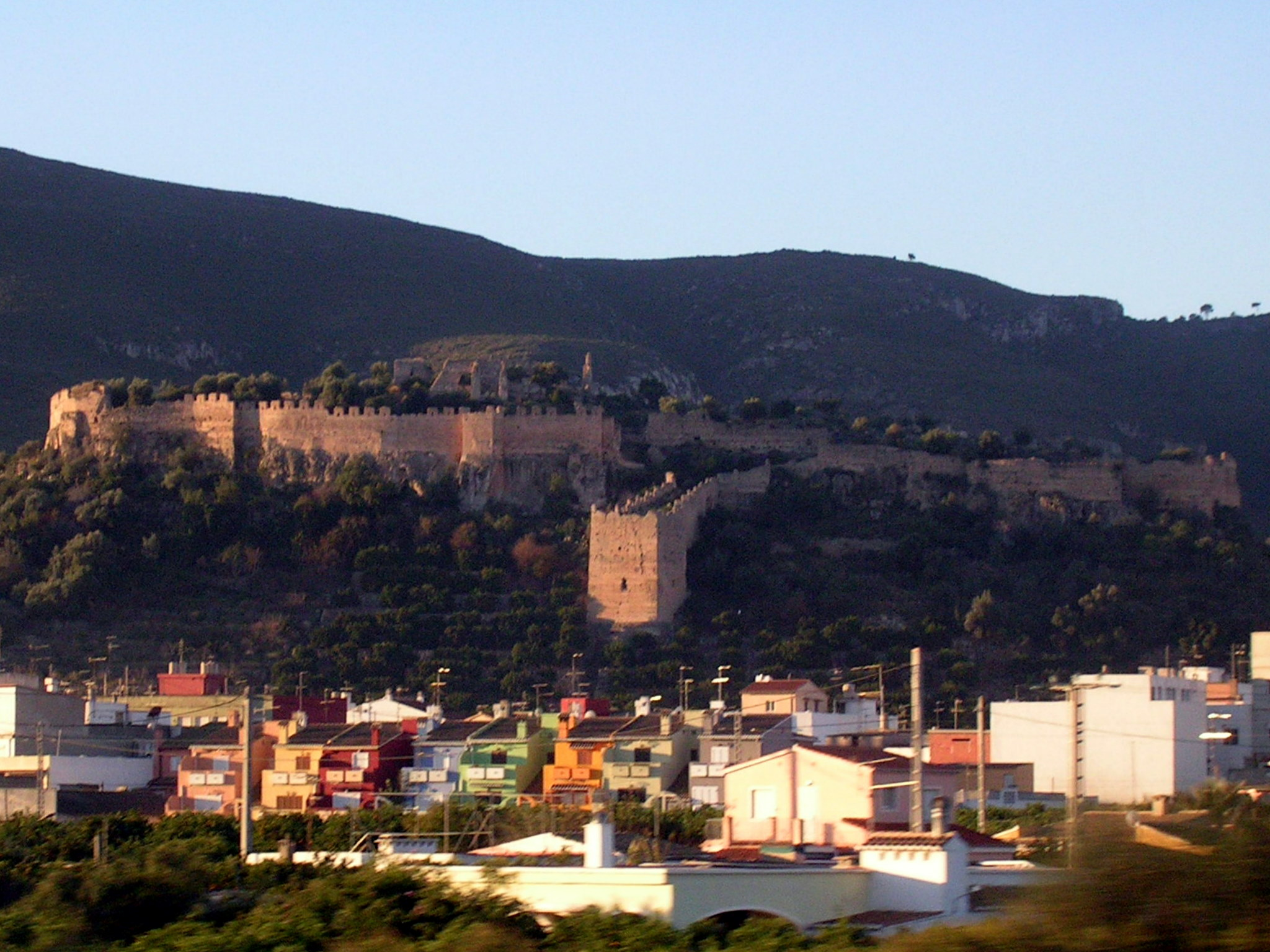 Castell de Corbera (Ribera Baixa)